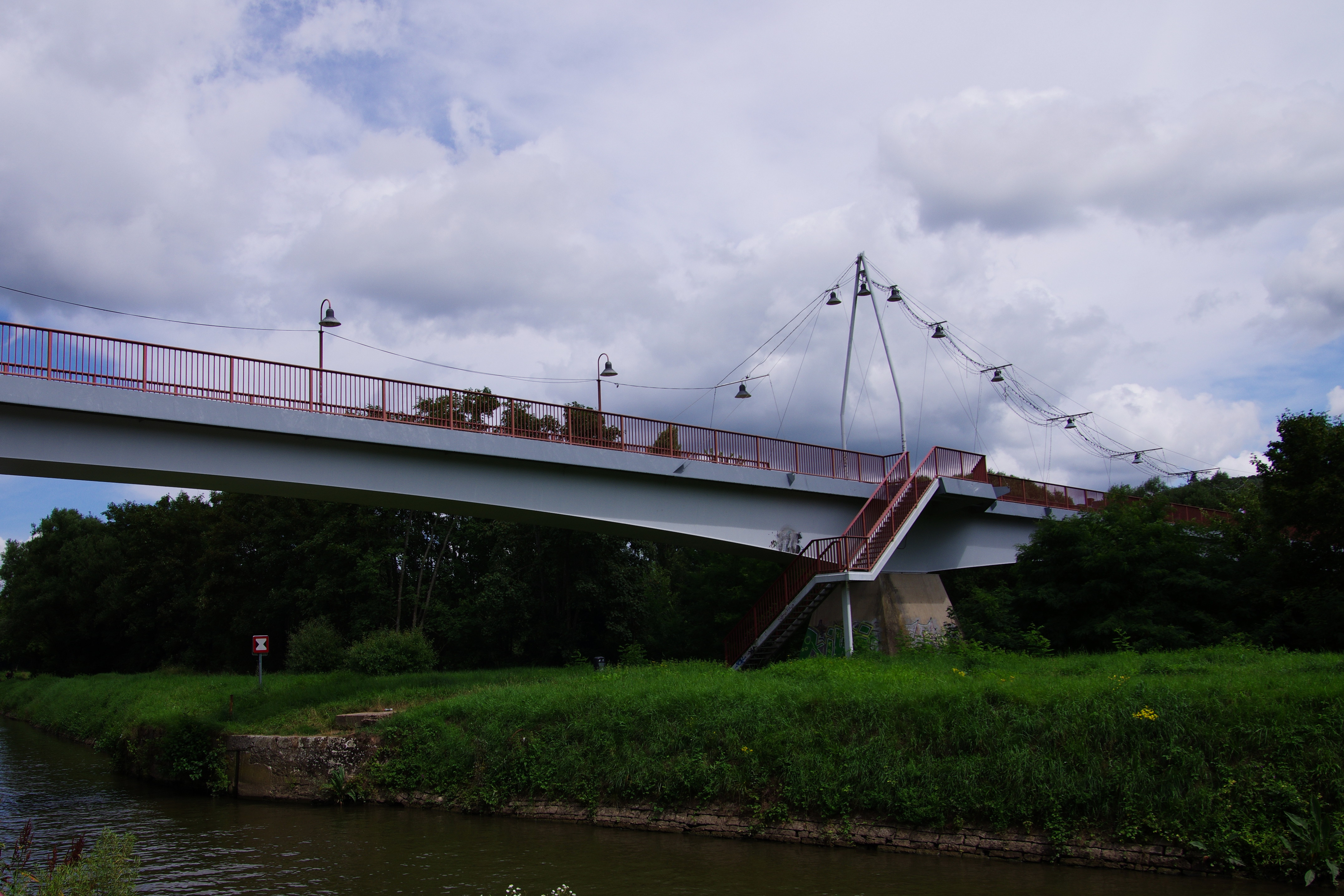 Brücke über die Saar und den Saarkanal, verbindet die Orte Kleinblittersdorf und Grosbliederstroff, Brückenbau von 1993.